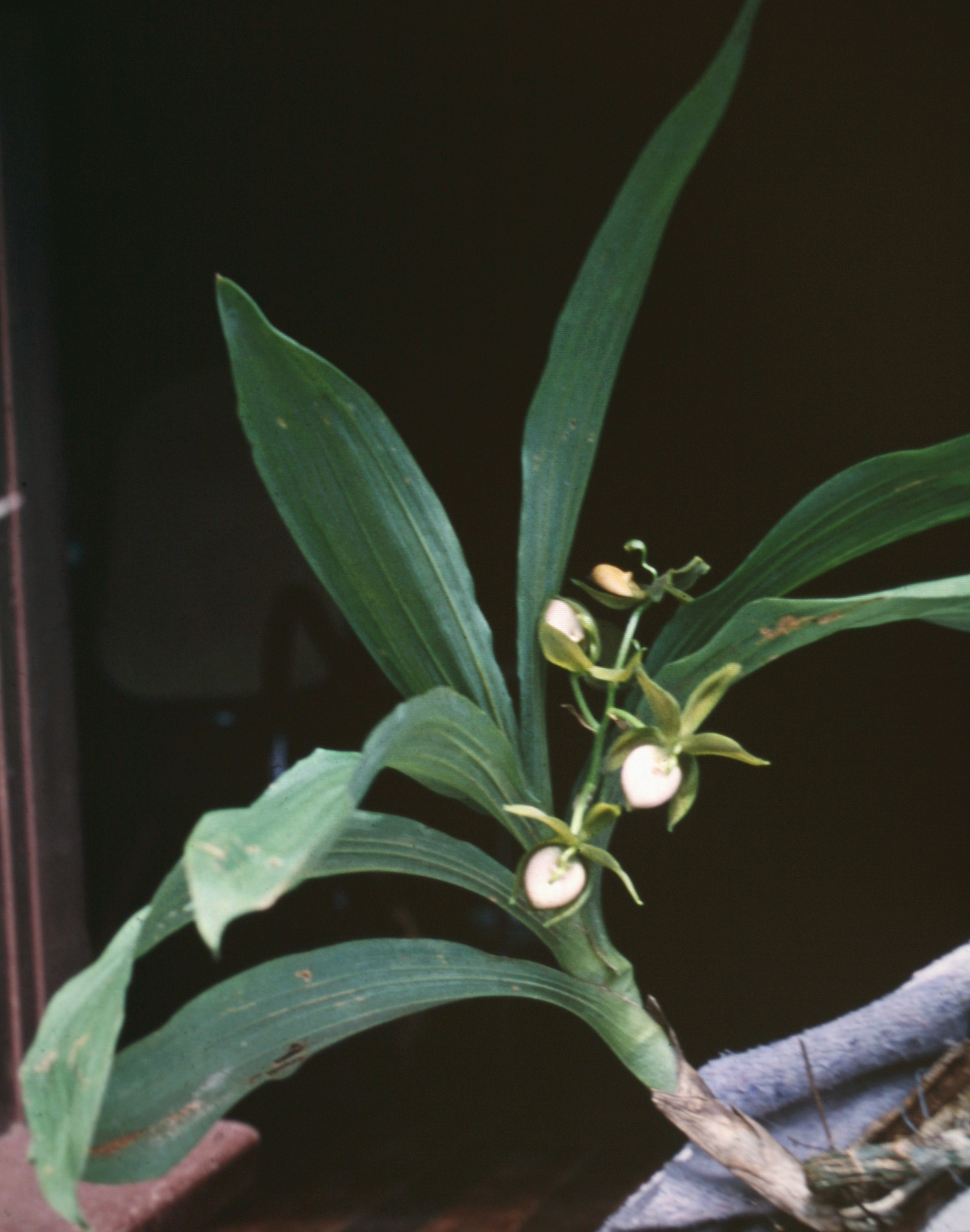 Cycnoches haagii, Suriname.